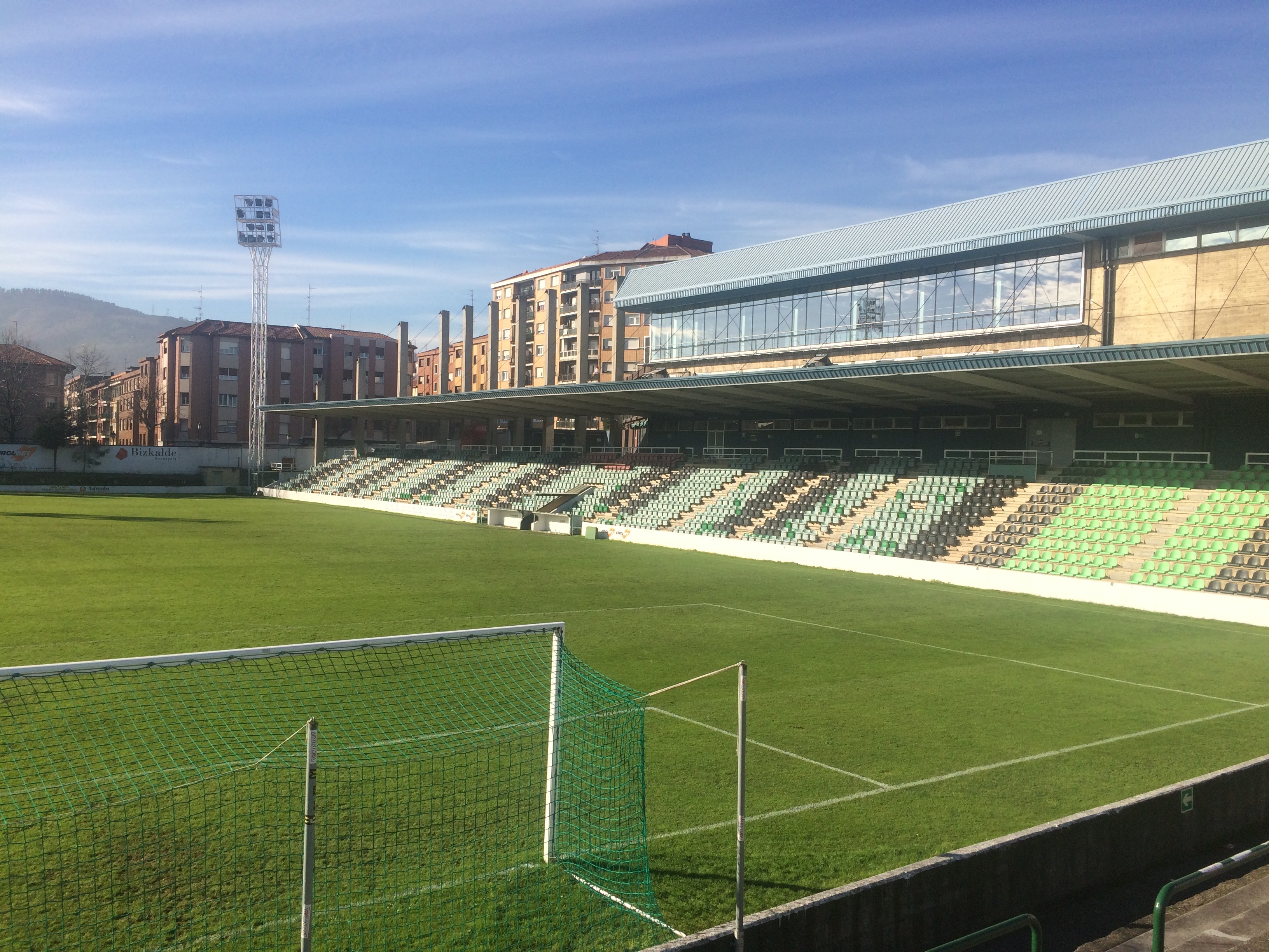 Foto de la tribuna principal del Campo Municipal de Las Llanas de Sestao